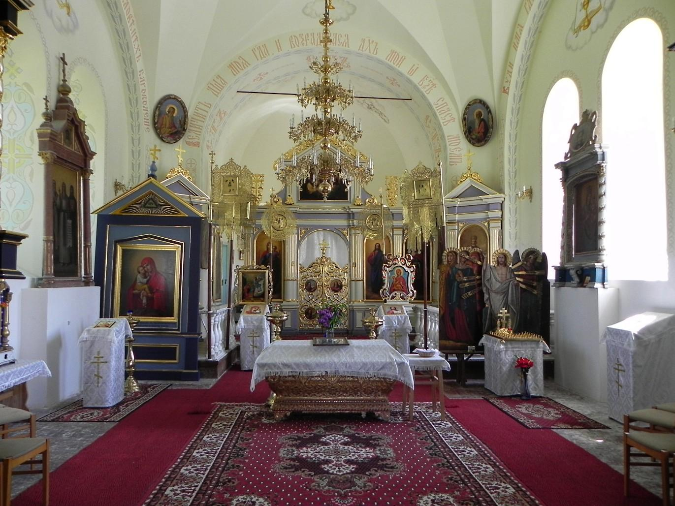 Wnętrze cerkwi w Bończy, z oryginalnym ikonostasem i wyposażeniem z XVIII i XIX wieku.